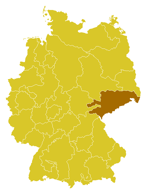 Katholische Diözese/Bistum in Deutschland Autor: Benutzer:WikiNight